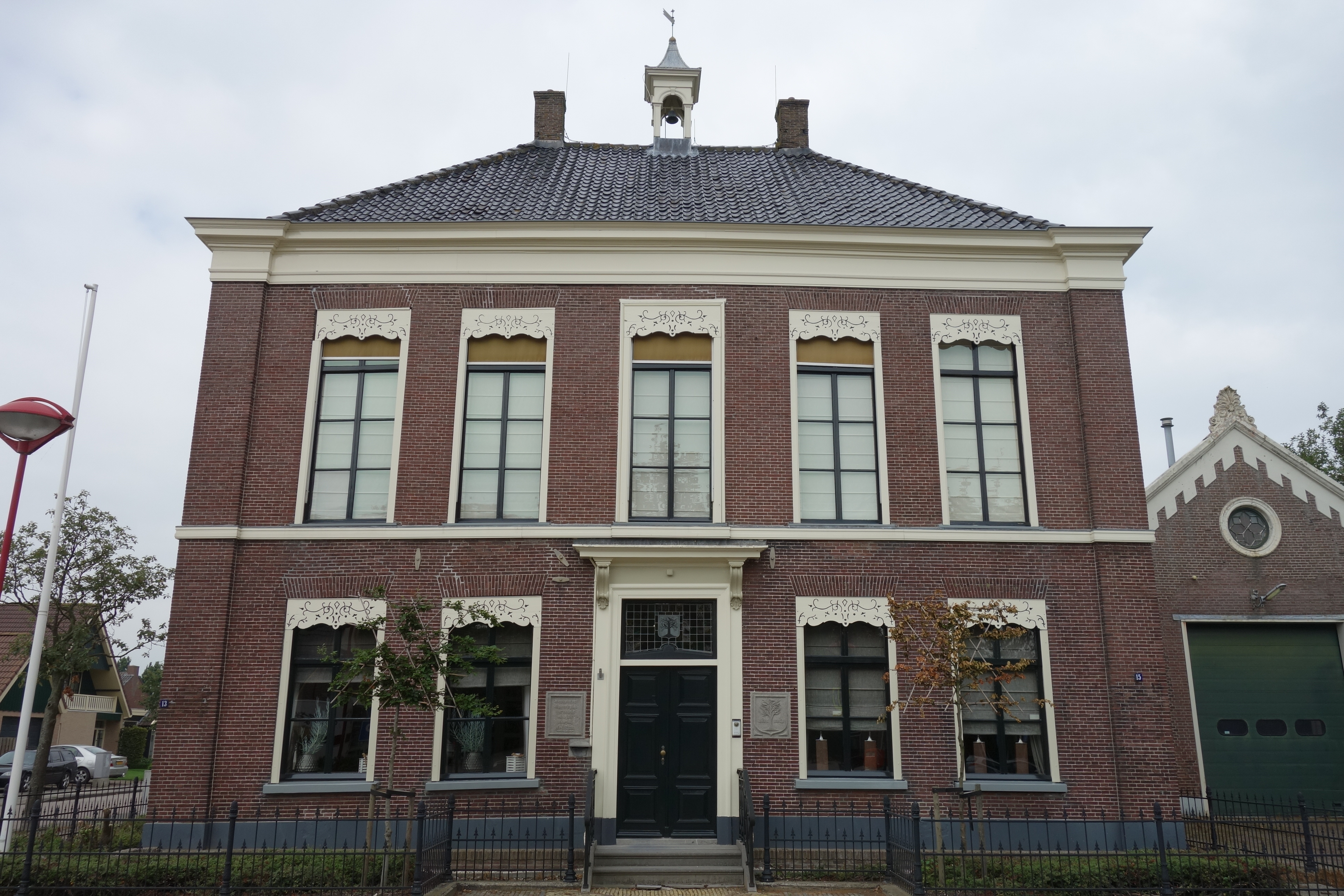 Voormalig Raadhuis in Westwoud. Pand is in 1855 gebouwd en heeft twee gevelstenen in gotisch schrift.